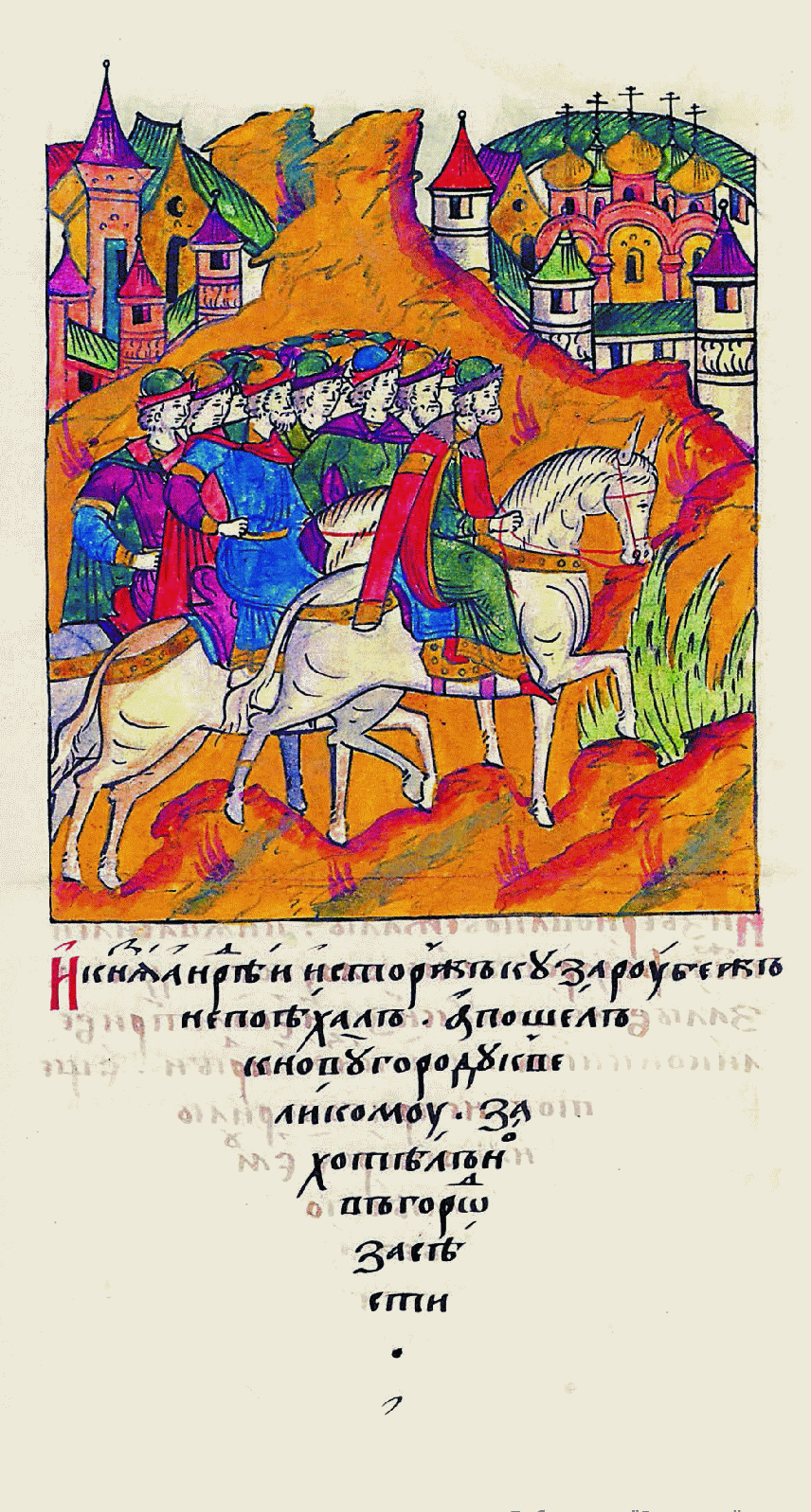 Миниатюра Лицевого летописного свода XVI в.: "И князь Андрей из Торжка за рубеж не по- ехал, а пошел к Нов- городу Великому, захотел в Новгороде засесть».